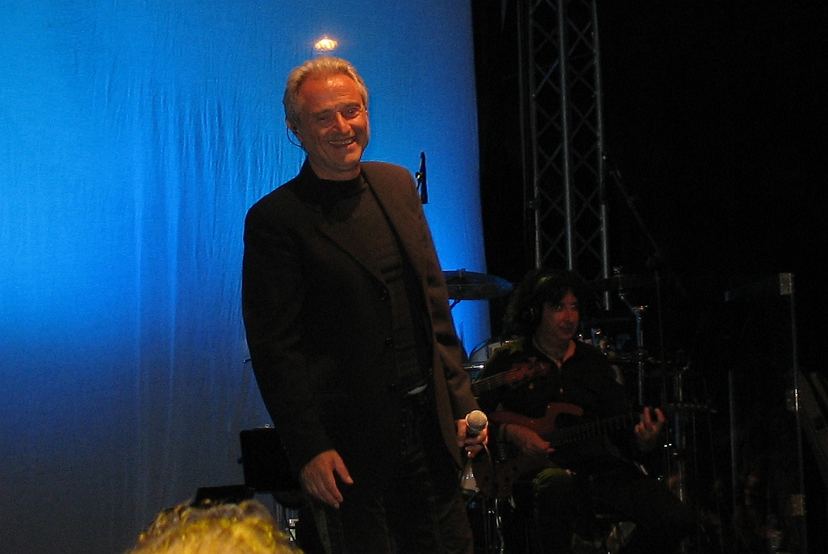 Il cantautore in un concerto in piazza in Calabria